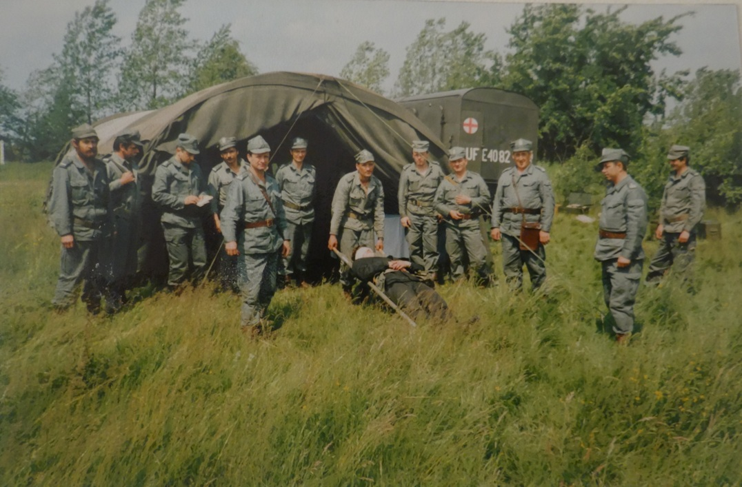 Kadra i żołnierze 45 Batalionu Medycznego podczas szkolenia na poligonie